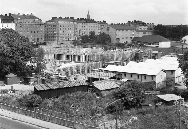 Folksamhuset byggs, i bakgrunden syns Högre allmänna läroverket för flickor å Södermalm (Södra flickläroverket)